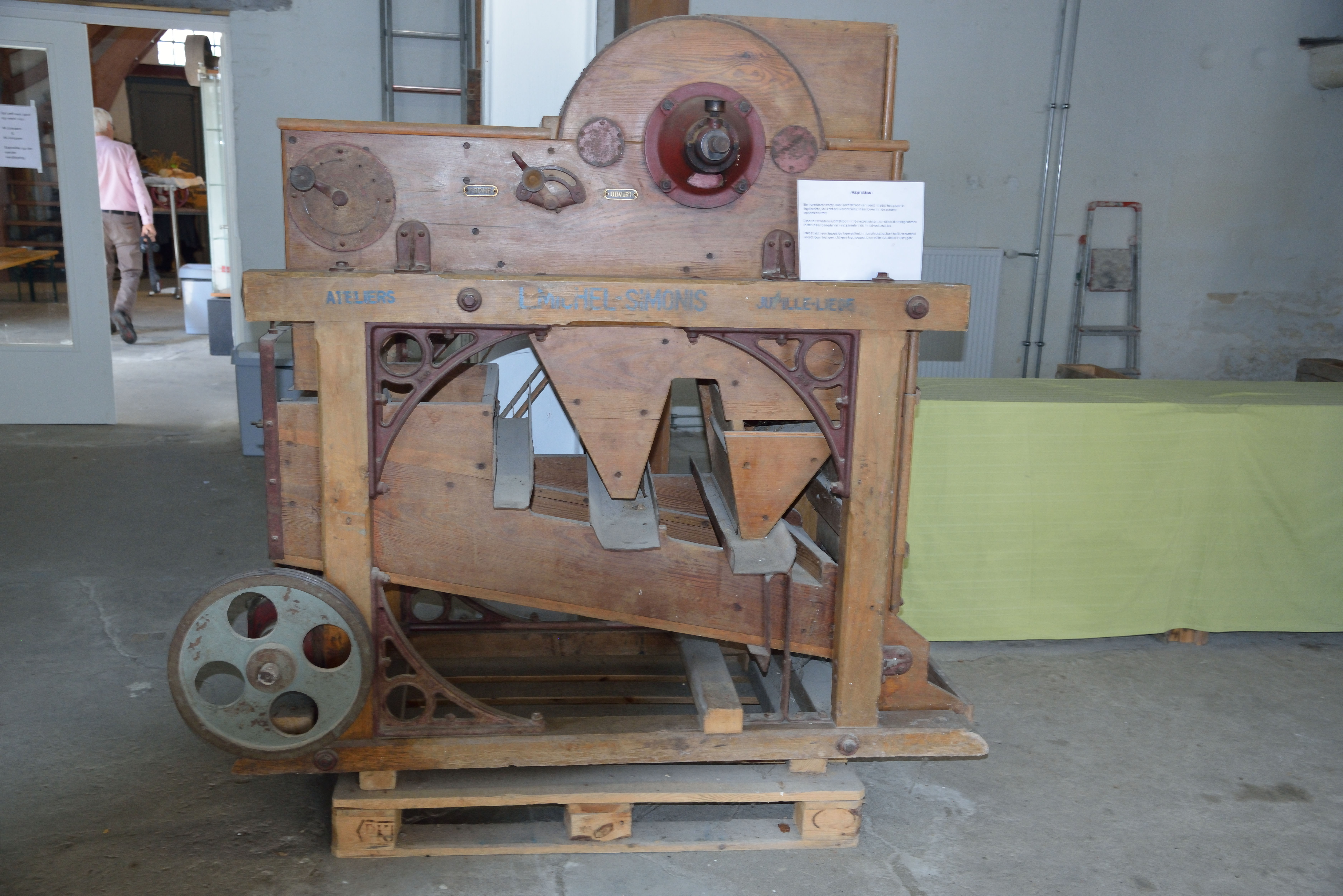 Oude of Banmolen, Valkenburg, aspirateur. Een luchtstroom voert de verontreinigingen naar een expansieruimte.